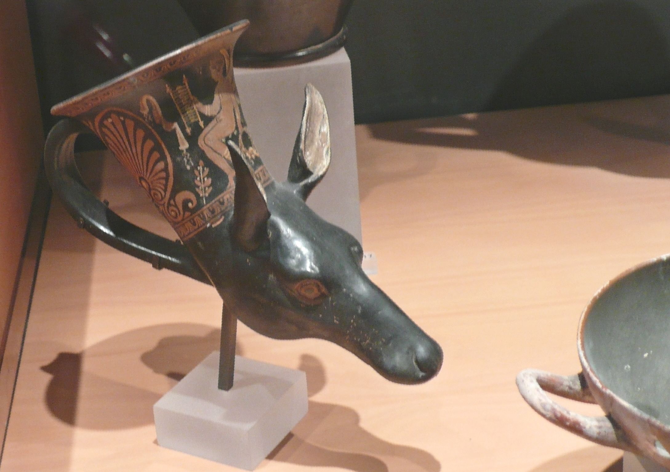 Rhyton, vase à boire en forme de tête d'animal, Apulie, vers 330 av. J.C., antiquités classiques musée d'archéologie méditerranéenne à la vieille charité à Marseille.